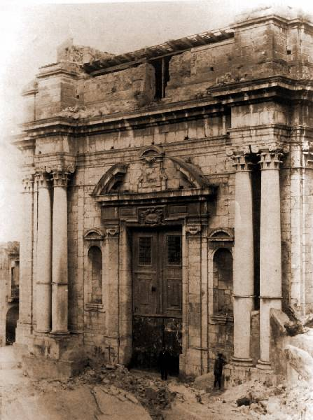 Church Messina Chiesa di San Giovanni Battista dei Gesuiti